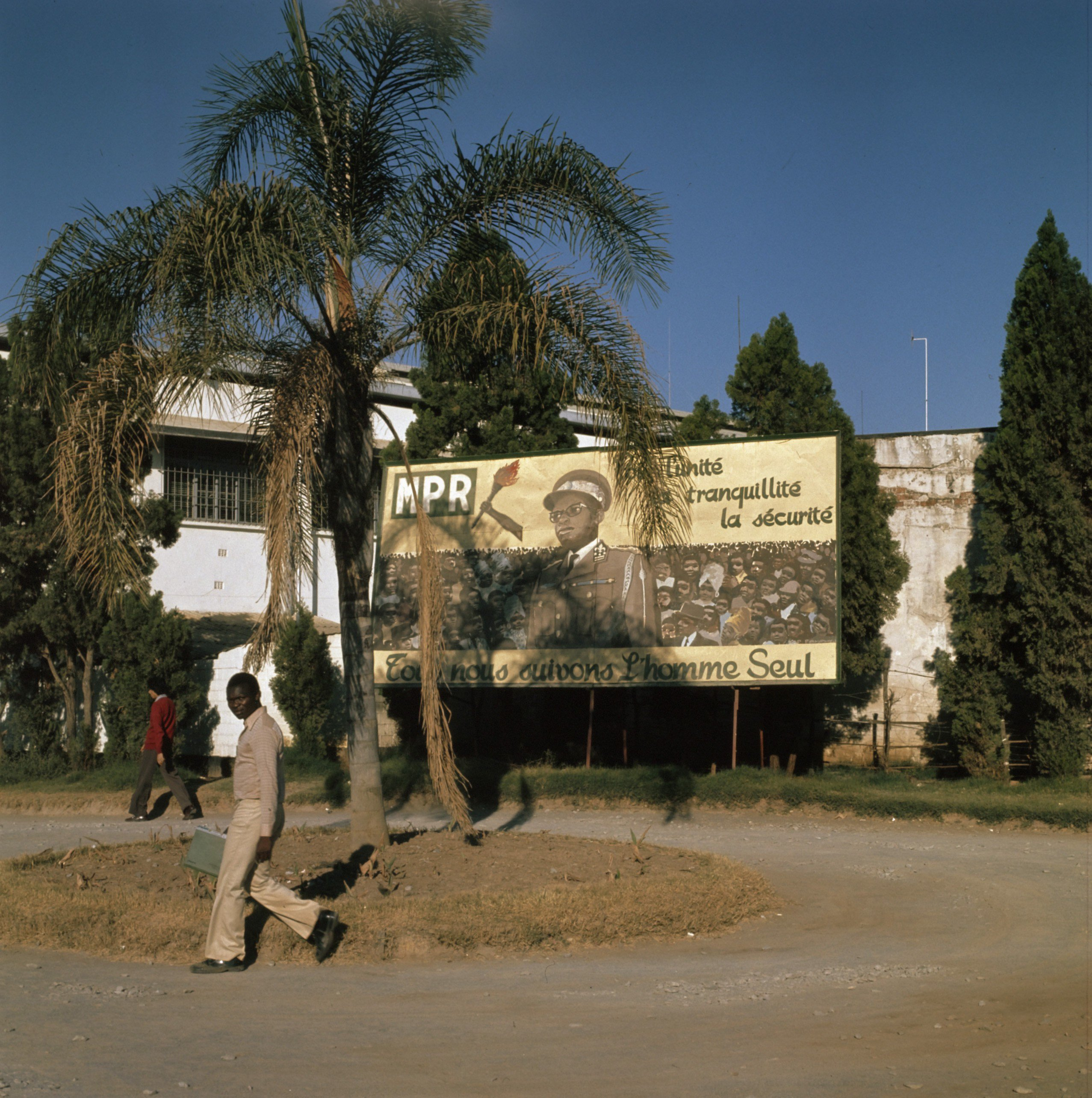 Collectie / Archief : Fotocollectie Anefo Reportage / Serie : [ onbekend ] Beschrijving : Zaire (voorheen Belgisch Congo ); straatbeelden Kinshasa Datum : 16 augustus 1973 Locatie : Belgisch Congo, Zaïre Trefwoorden : STRAATBEELDEN Persoonsnaam : Kinshasa Fotograaf : Mieremet, Rob / Anefo Auteursrechthebbende : Nationaal Archief Materiaalsoort : Dia (kleur) Nummer archiefinventaris : bekijk toegang 2.24.01.07 Bestanddeelnummer : 254-9365